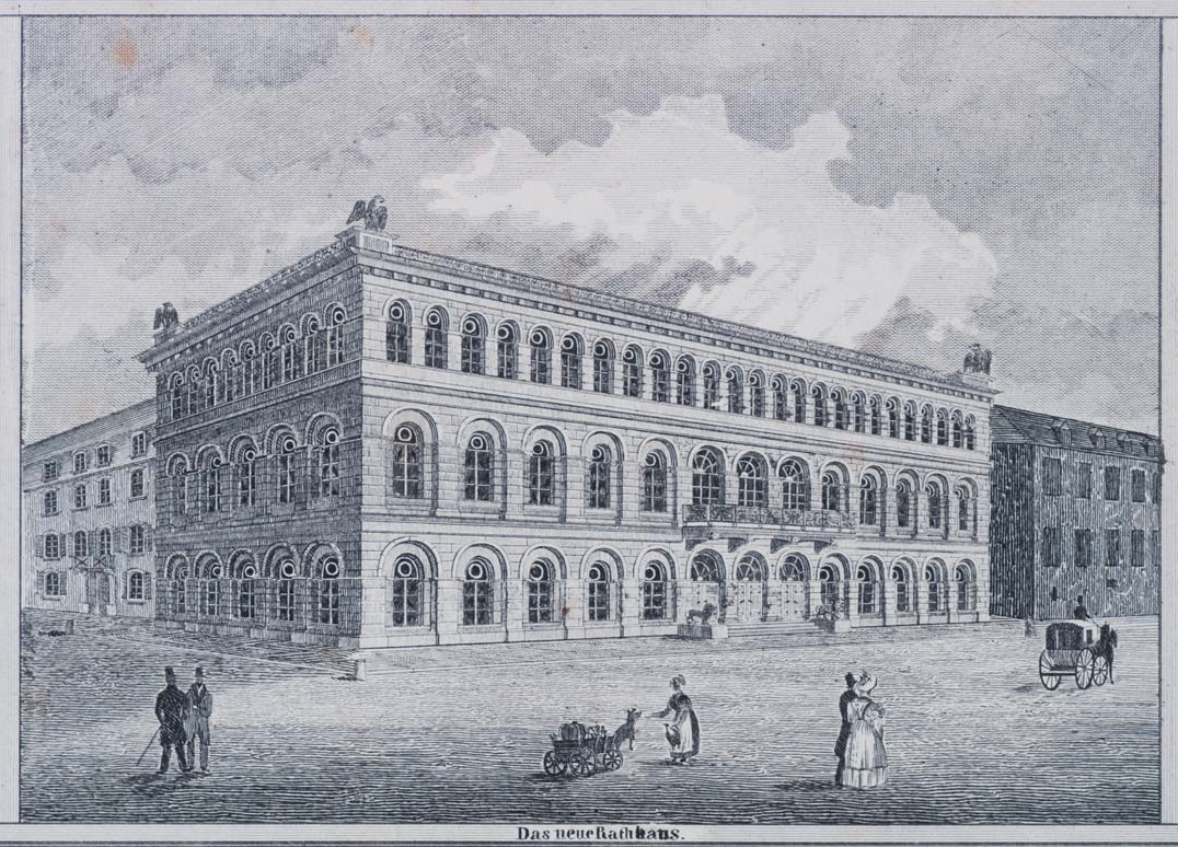 Das neue Rathaus, Detail aus Henry Abbot, Elberfeld im Grundriß und mit seinen vorzüglichsten Gebäuden, 1828, Lithographie. Kunsthaus Braun Antiquariat